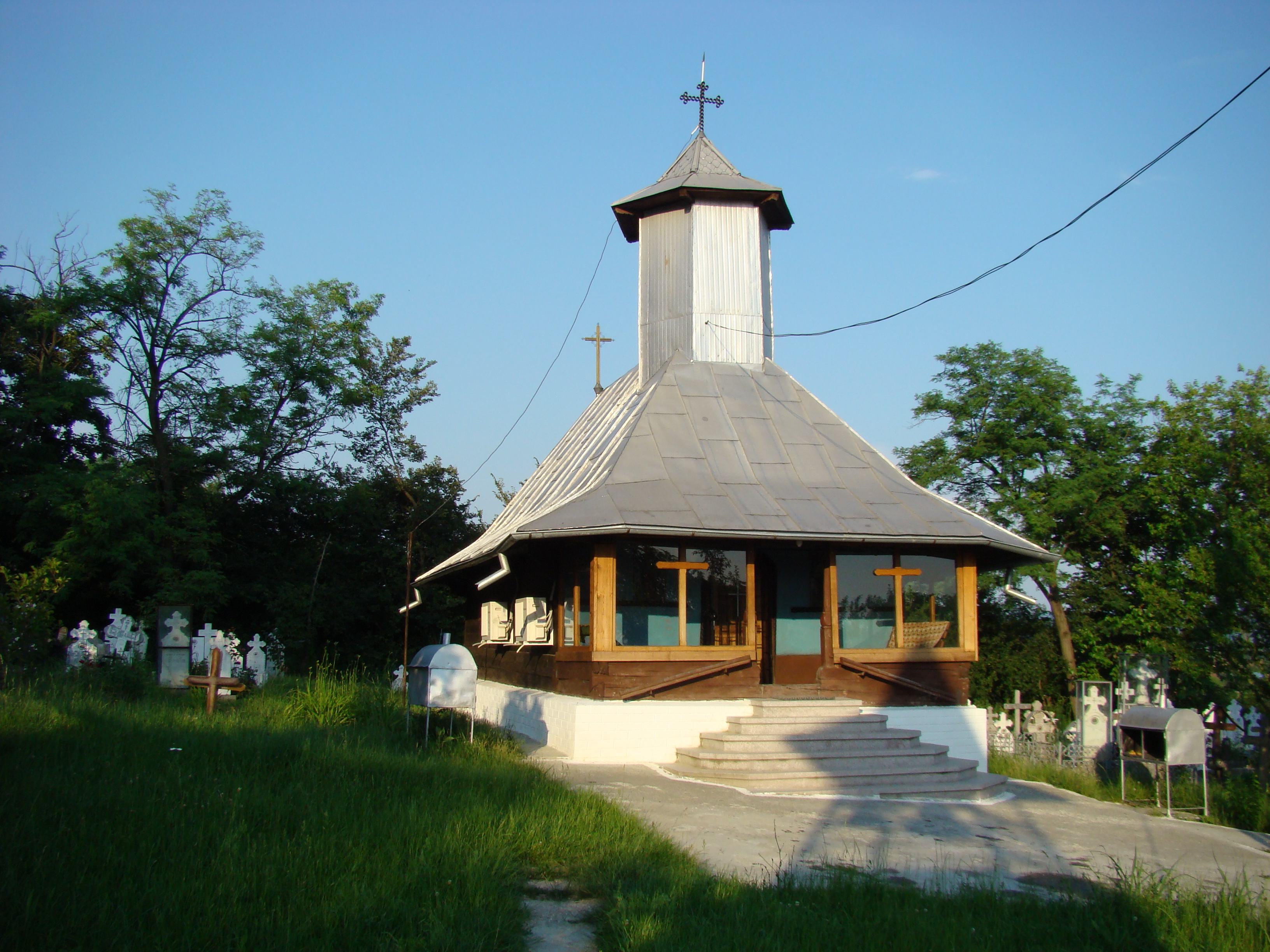 Băbeni, Vâlcea